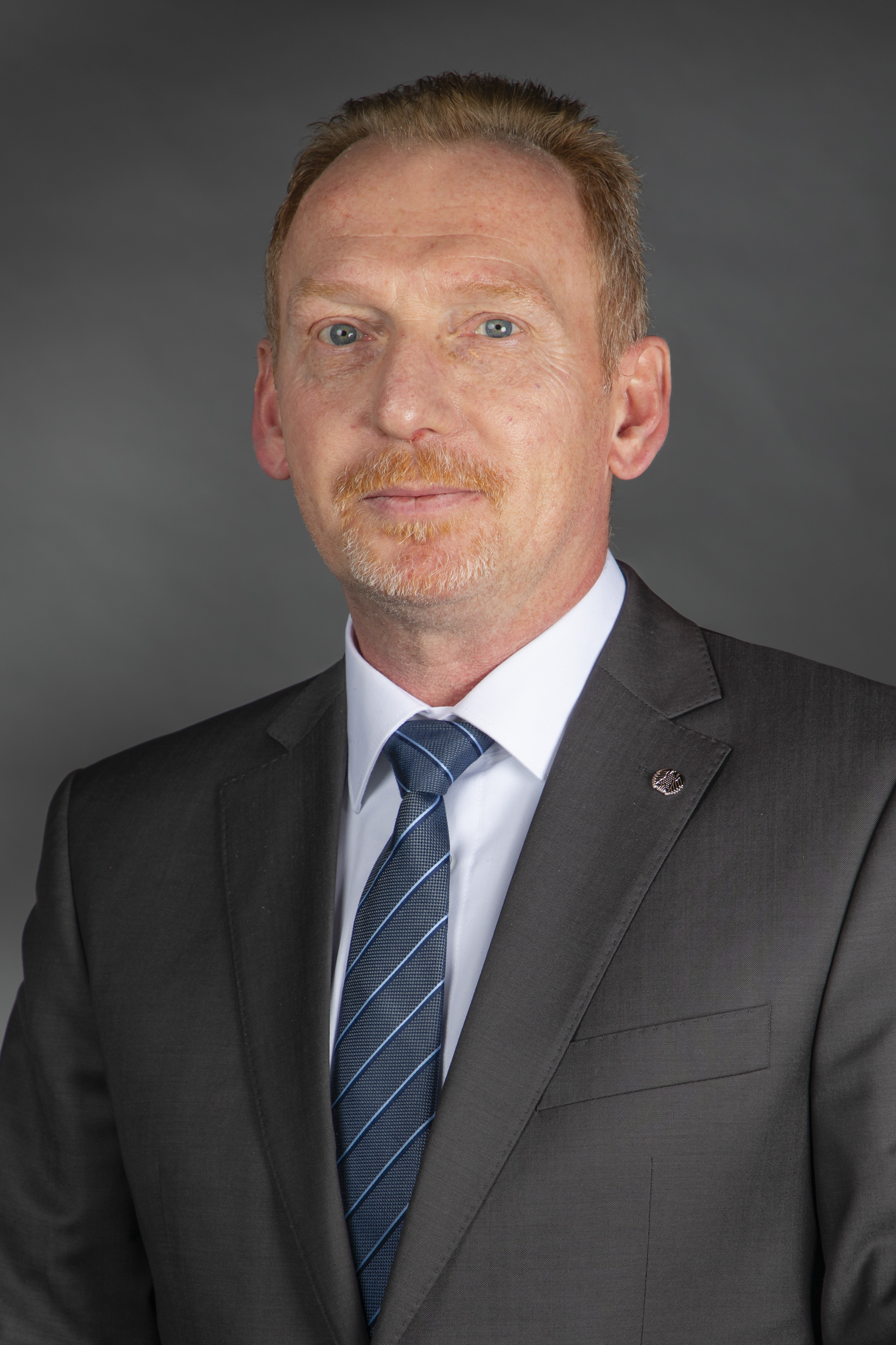 Uwe Felgenträger